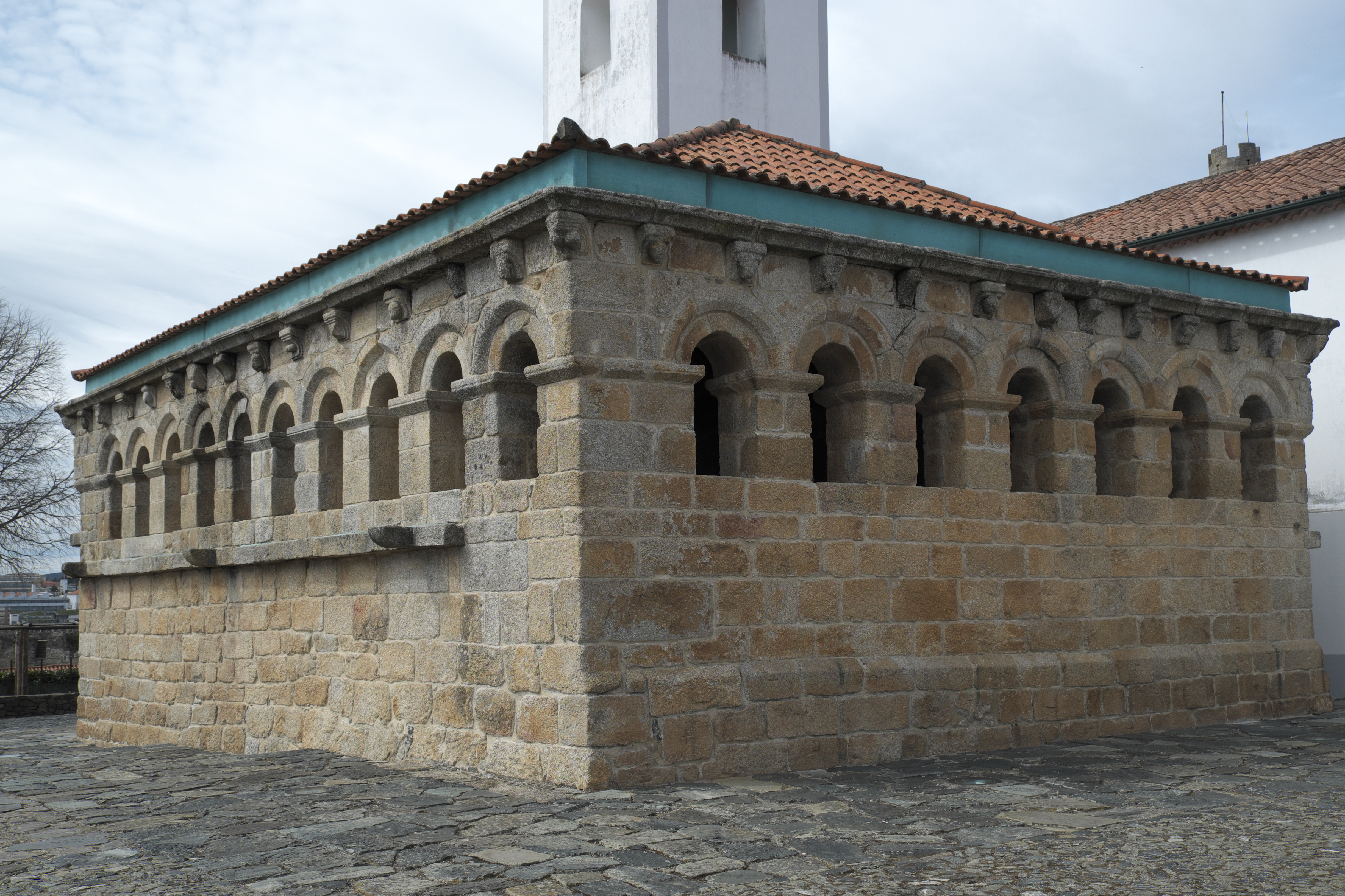 Ehemaliges Rathaus, Domus Municipalis, in Bragança in Nordportugal